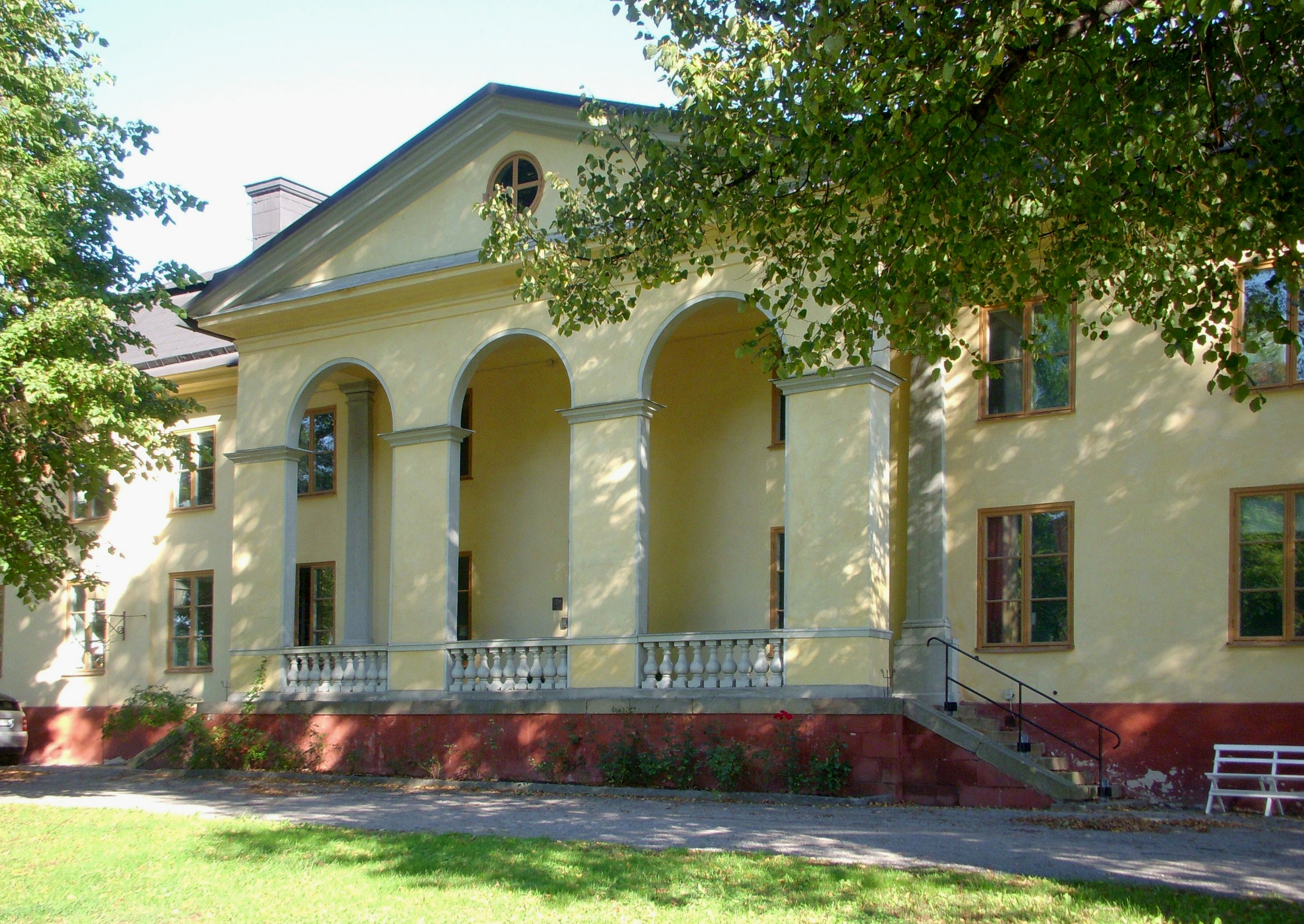 Långa raden 4 på Drottningholmsmalen "Kanslihuset"